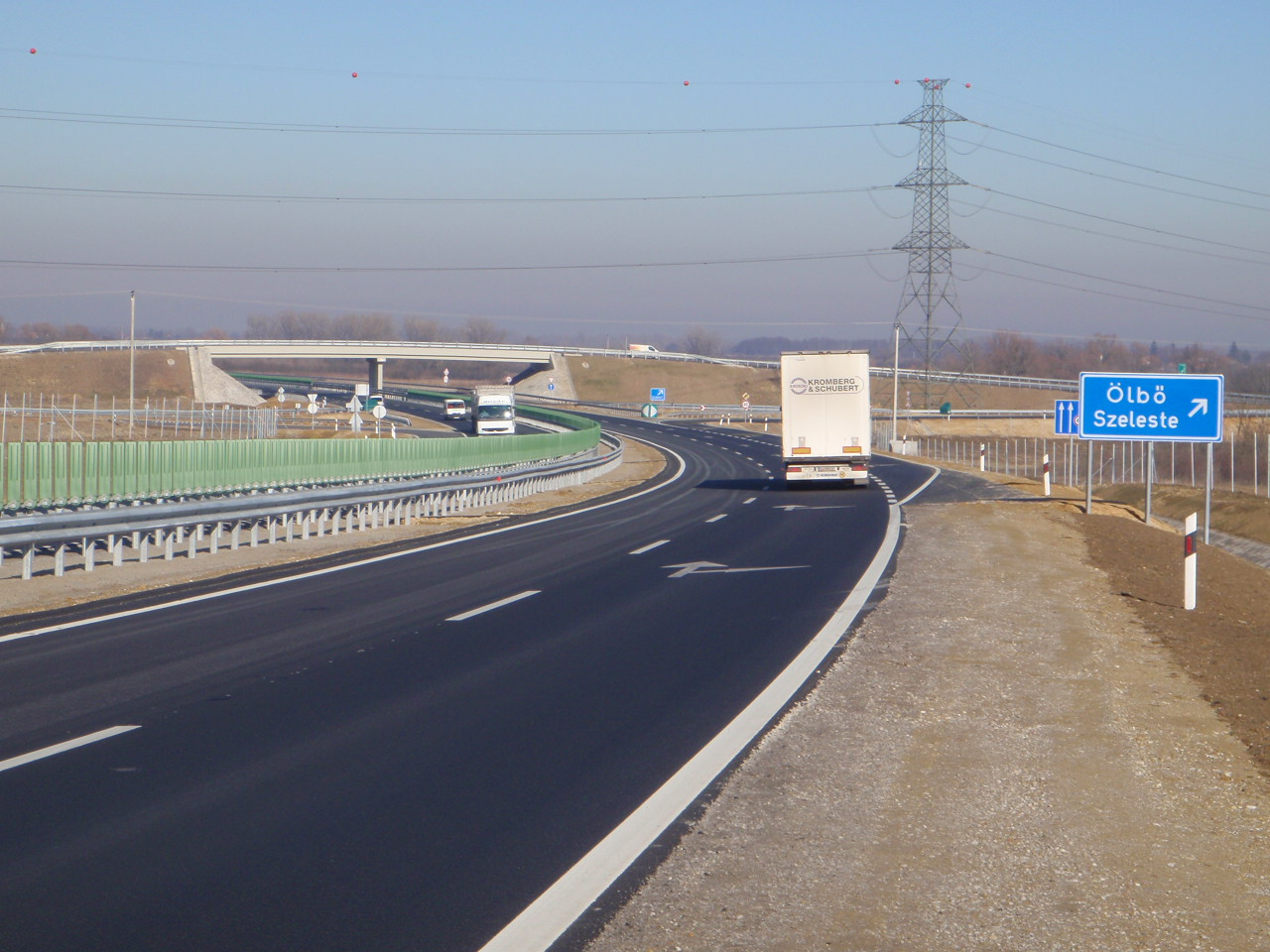 Steinamangererschnellstrasse Komitat Vas